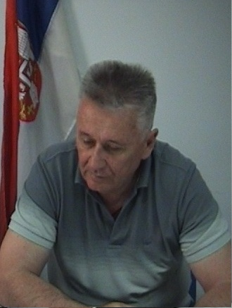 Састанак у Шапцу